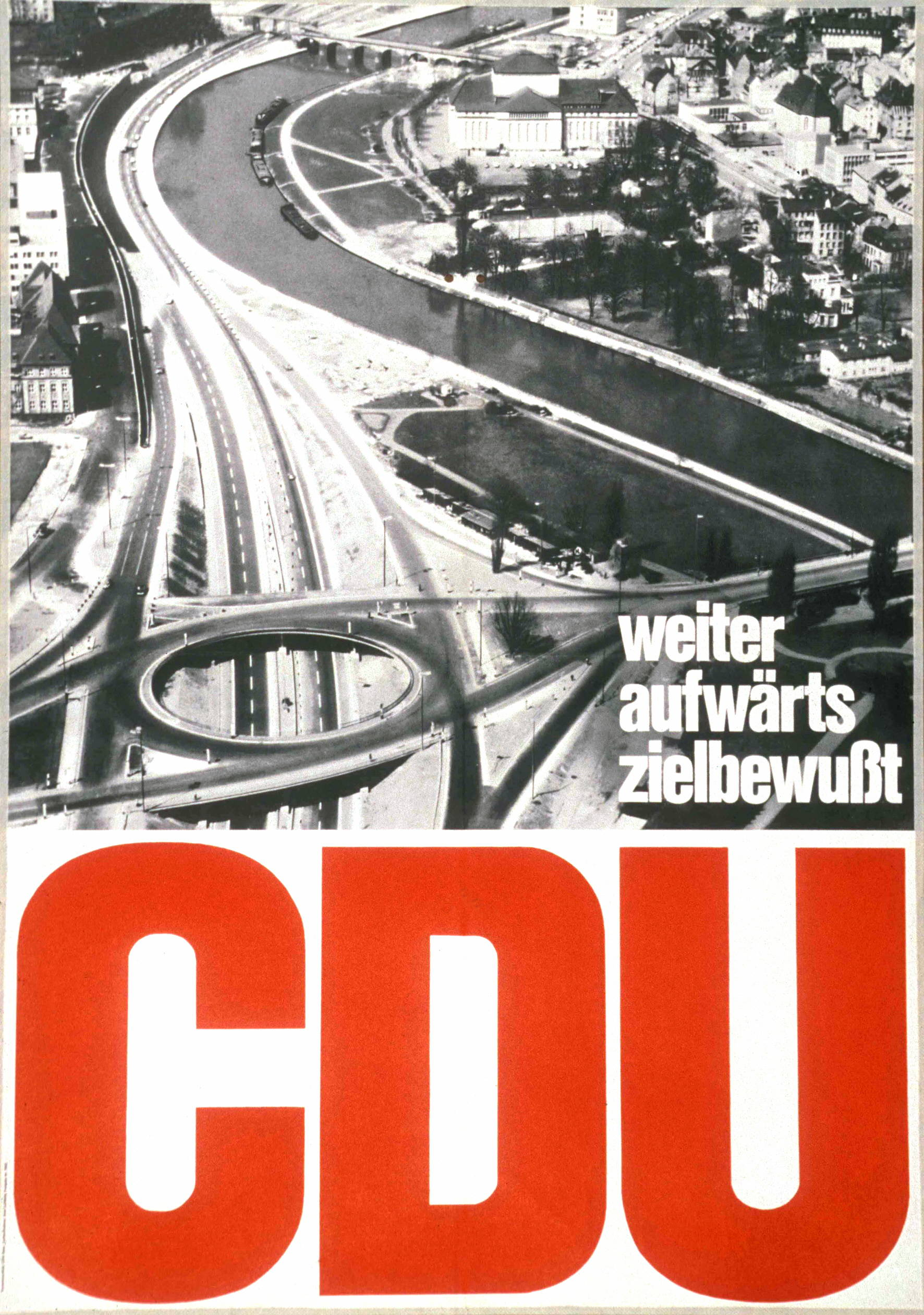 weiter aufwärts zielbewußt CDUAbbildung:Saarbrücken - AutobahnKommentar:Luftaufnahme: Azur-Luftbild, Freigabe Nr. 7043 Das Plakat wurde ursprünglich im saarländischen Landtagswahlkampf, Wahltag 27.6. 1965, eingesetzt und kam dann auch im Bundestagswahlkampf zum Einsatz.Plakatart:Motiv-/TextplakatKünstler_Grafiker:Die Werbe GmbH & Co, Werbeagentur GWA, EssenAuftraggeber:Verantw.: CDU-SaarObjekt-Signatur:10-001: 1109Bestand:Plakate zu Bundestagswahlen (10-001)GliederungBestand10-18:Plakate zu Bundestagswahlen (10-001) » Die 5. Bundestagswahl am 19. September 1965 » MotivplakateLizenz:KAS/ACDP 10-001: 1109 CC-BY-SA 3.0 DE